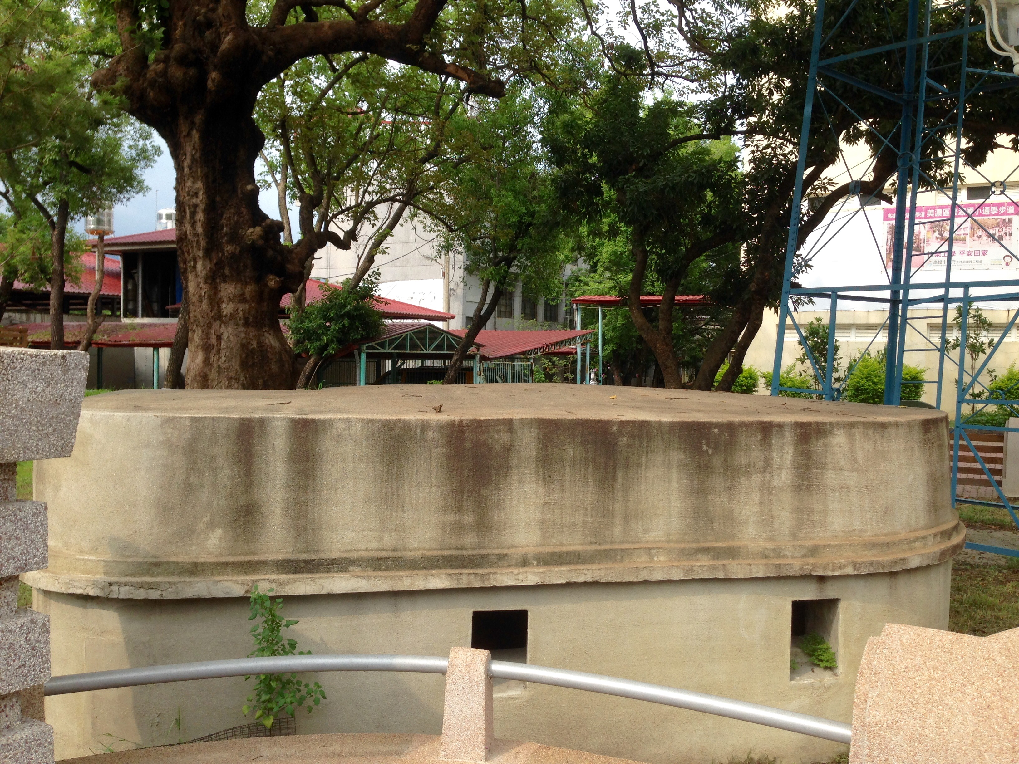 美濃警察分駐所碉堡